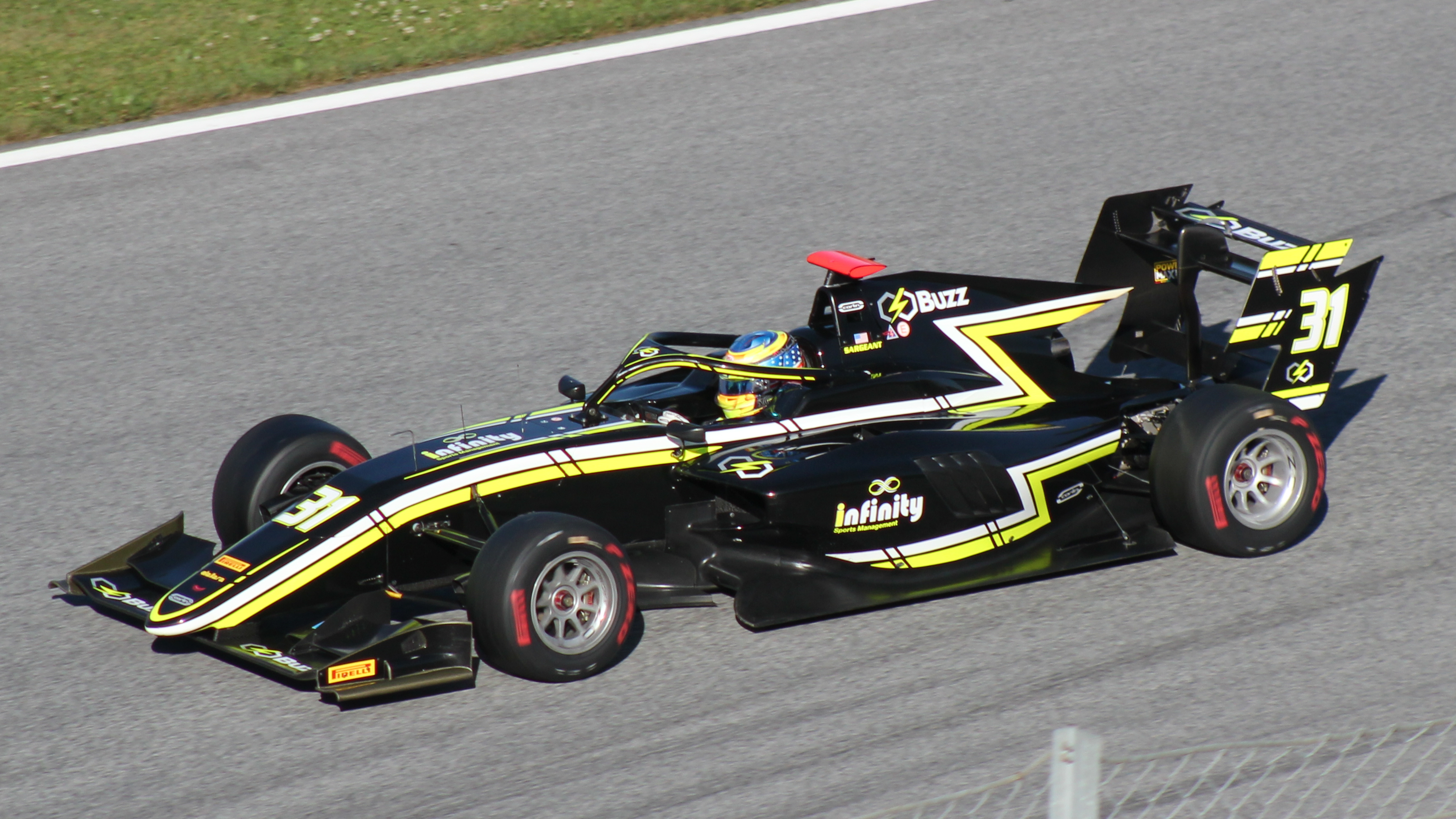 Sargeant beim Rennwochenende in Österreich 2019